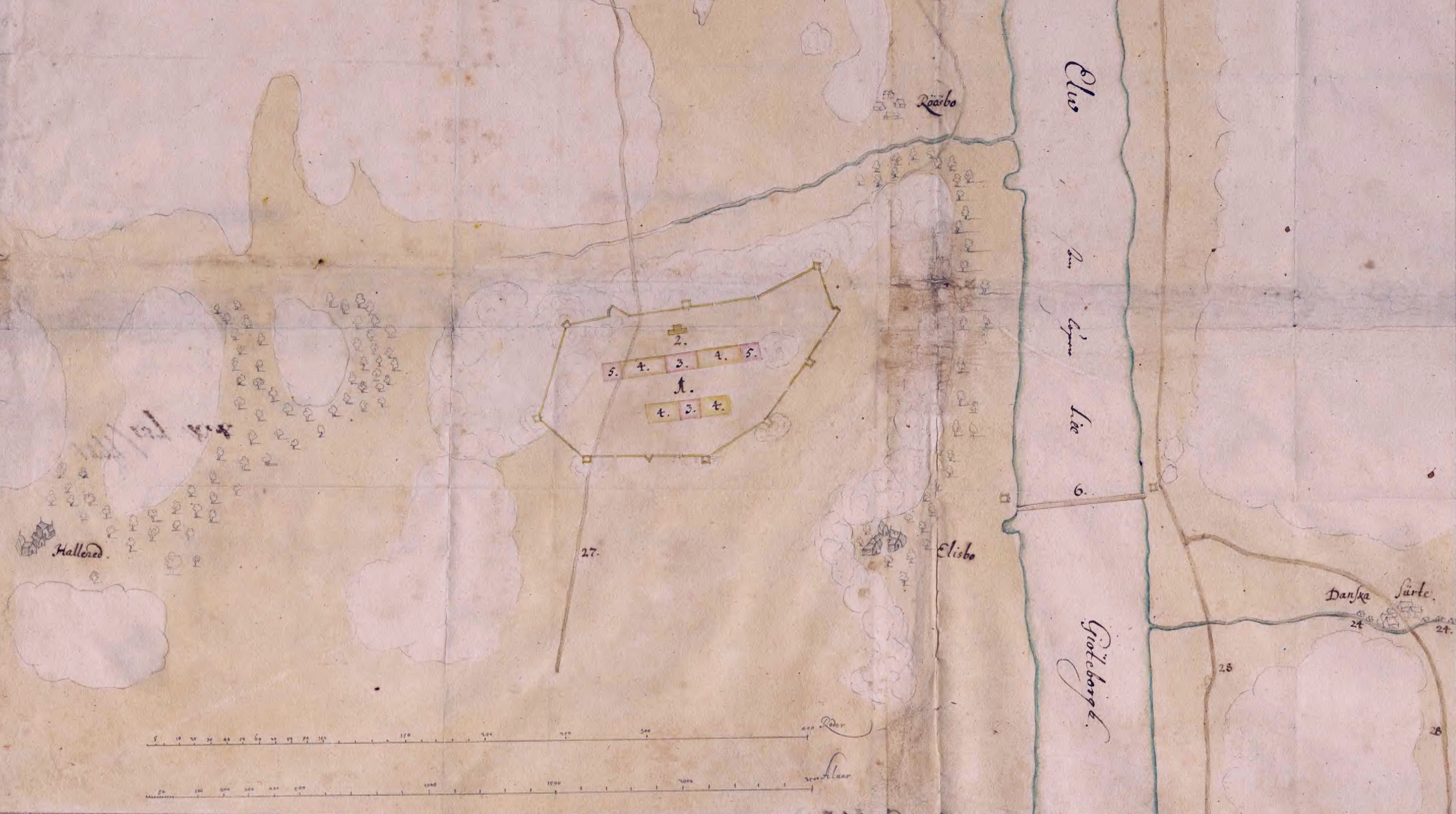 Detalj av situationskarta från augusti 1645, som visar ett befäst fältläger vid Ellesbo på nordöstra Hisingen. 1) Lägret, 2) Högkvarter, 3) Fotsoldaternas kvarter, 4) Kavalleriets kvarter, 5) Dragonernas kvarter, 6) Flottbro med två försvarande redutter 24) Kvarnar 27) Väg mellan Bohus och Göteborg, 28) Väg mellan Göteborg och Vänersborg